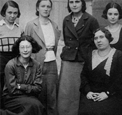 ヴェイユと生徒(ロアンヌ）トリミング correct "Le puy" to "Roanne"